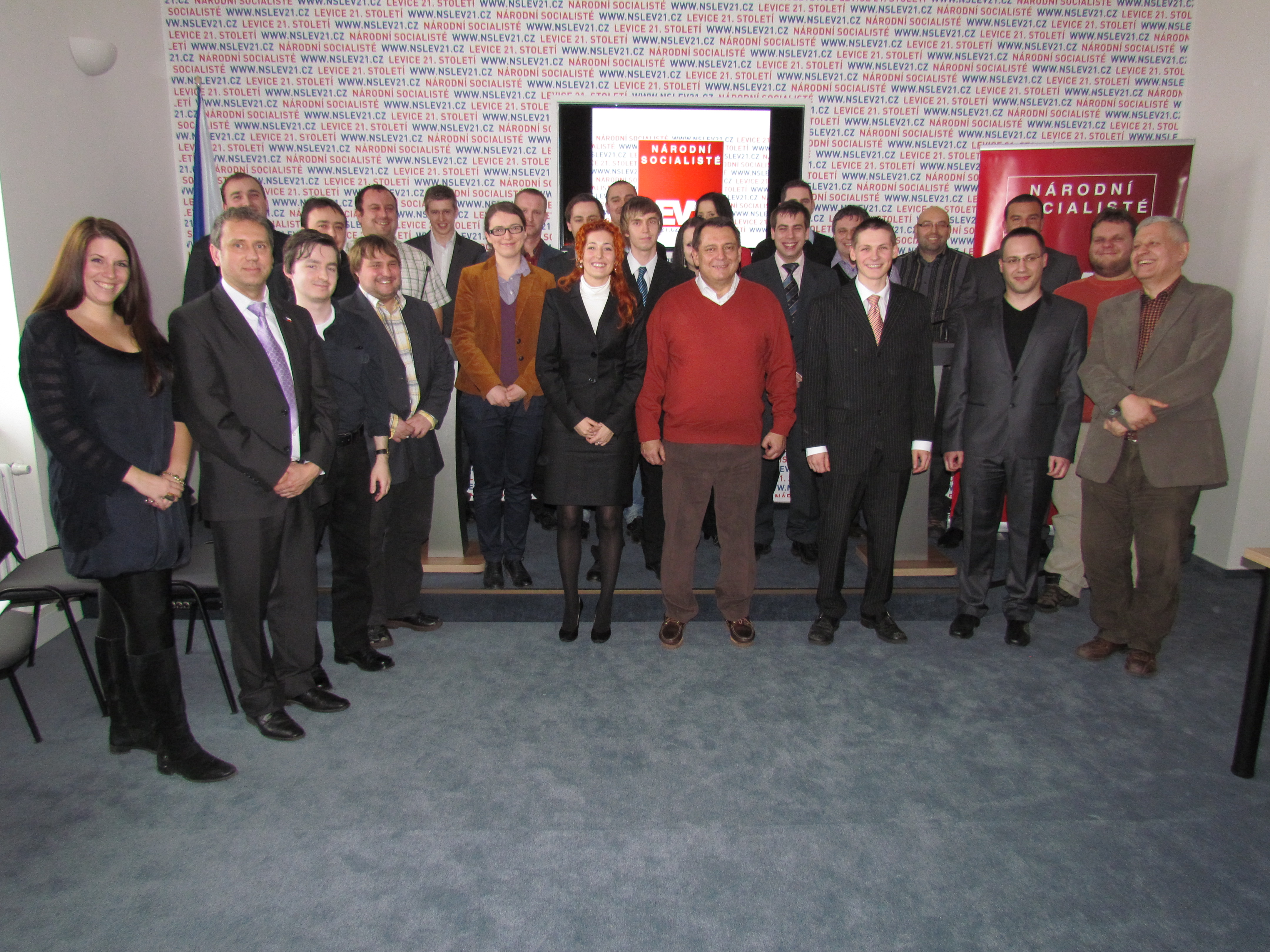 delegáti sjezdu MNS a hosté